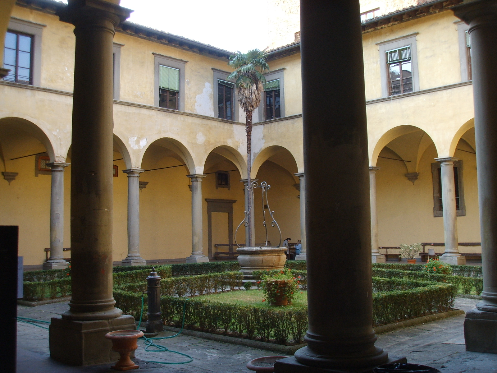 Santa Trinita, chiostro